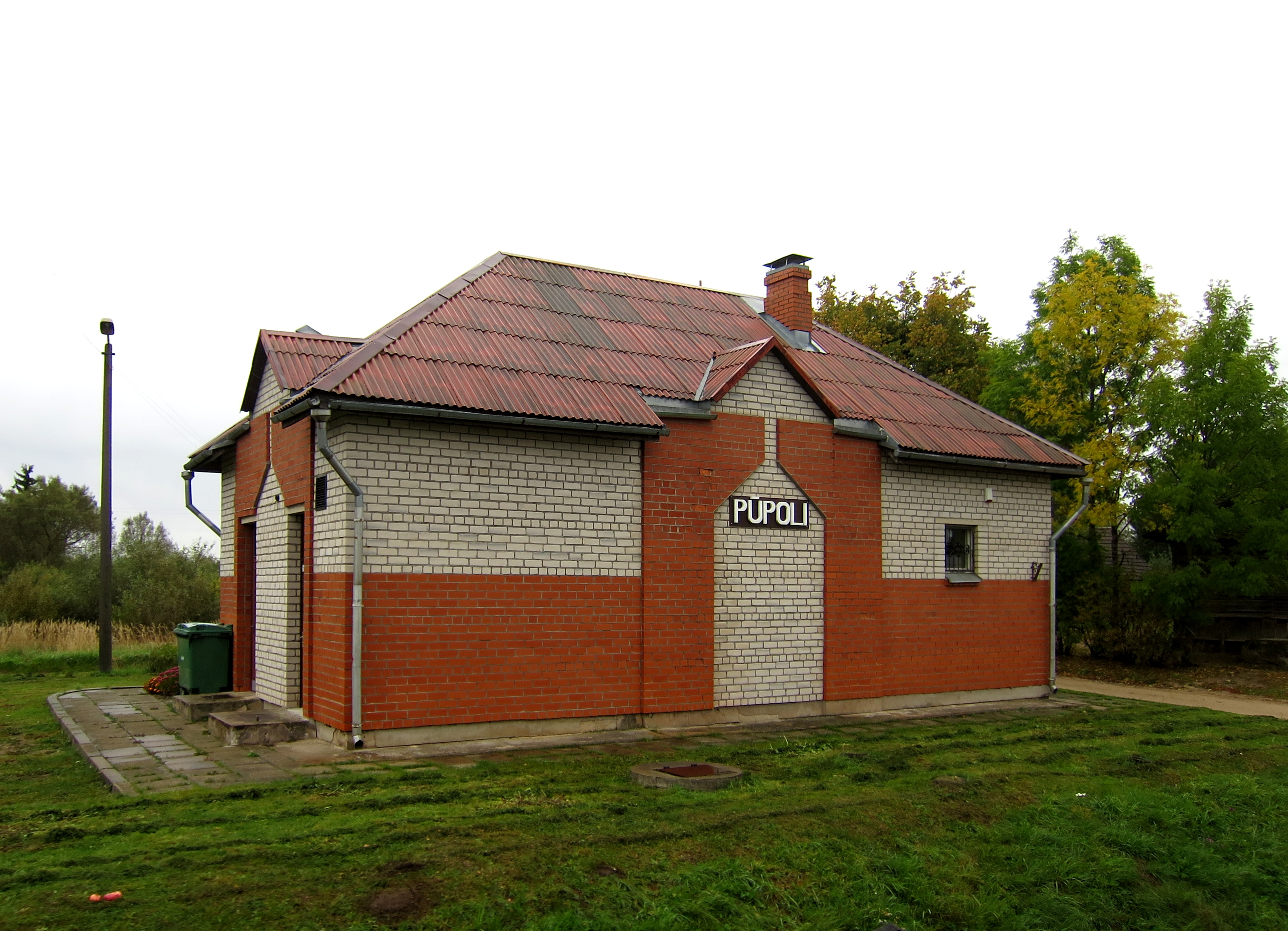 Pūpolu stacijas ēka 2018. gadā